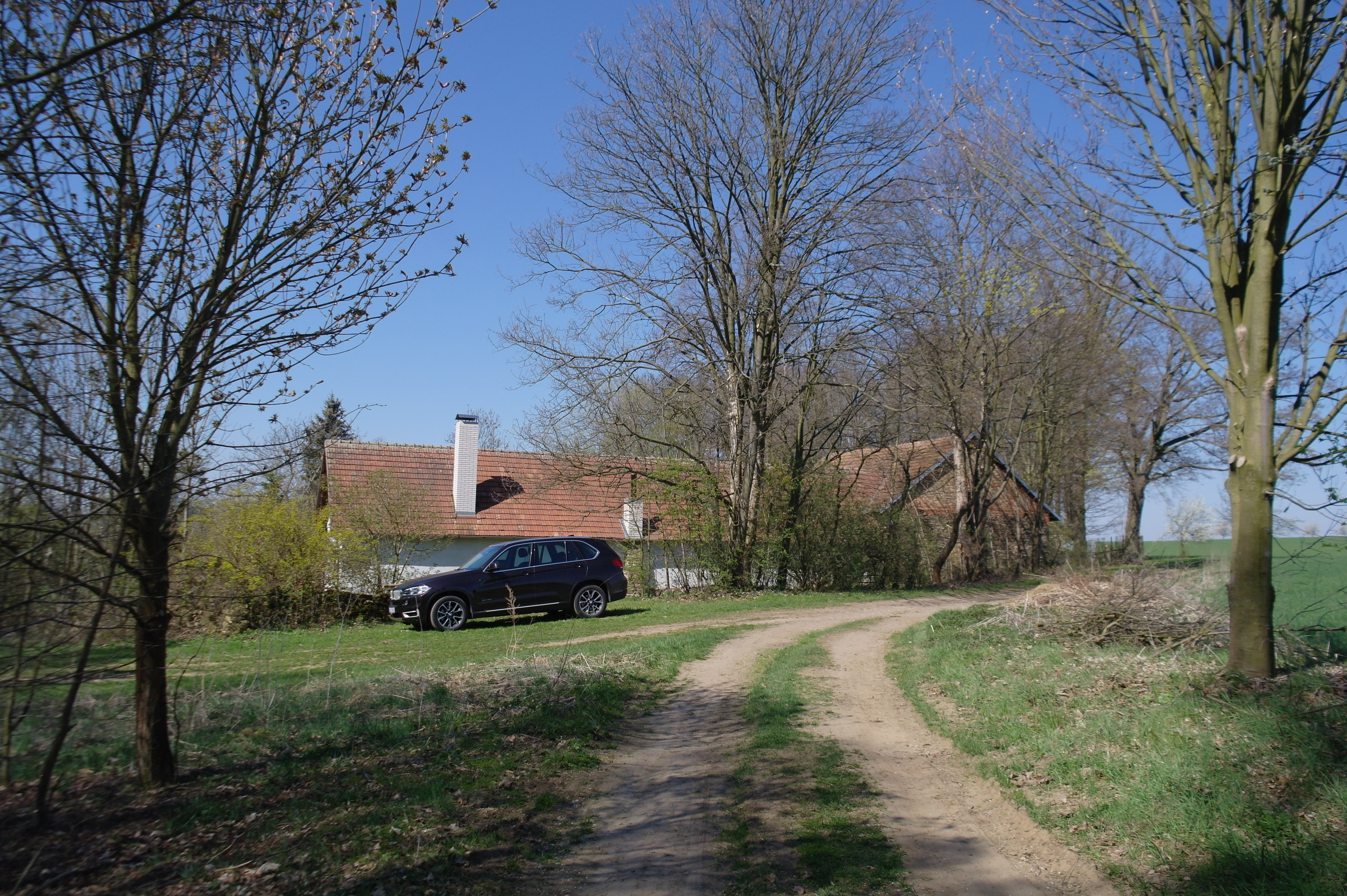 Volavka (Pravonín). Česká republika.